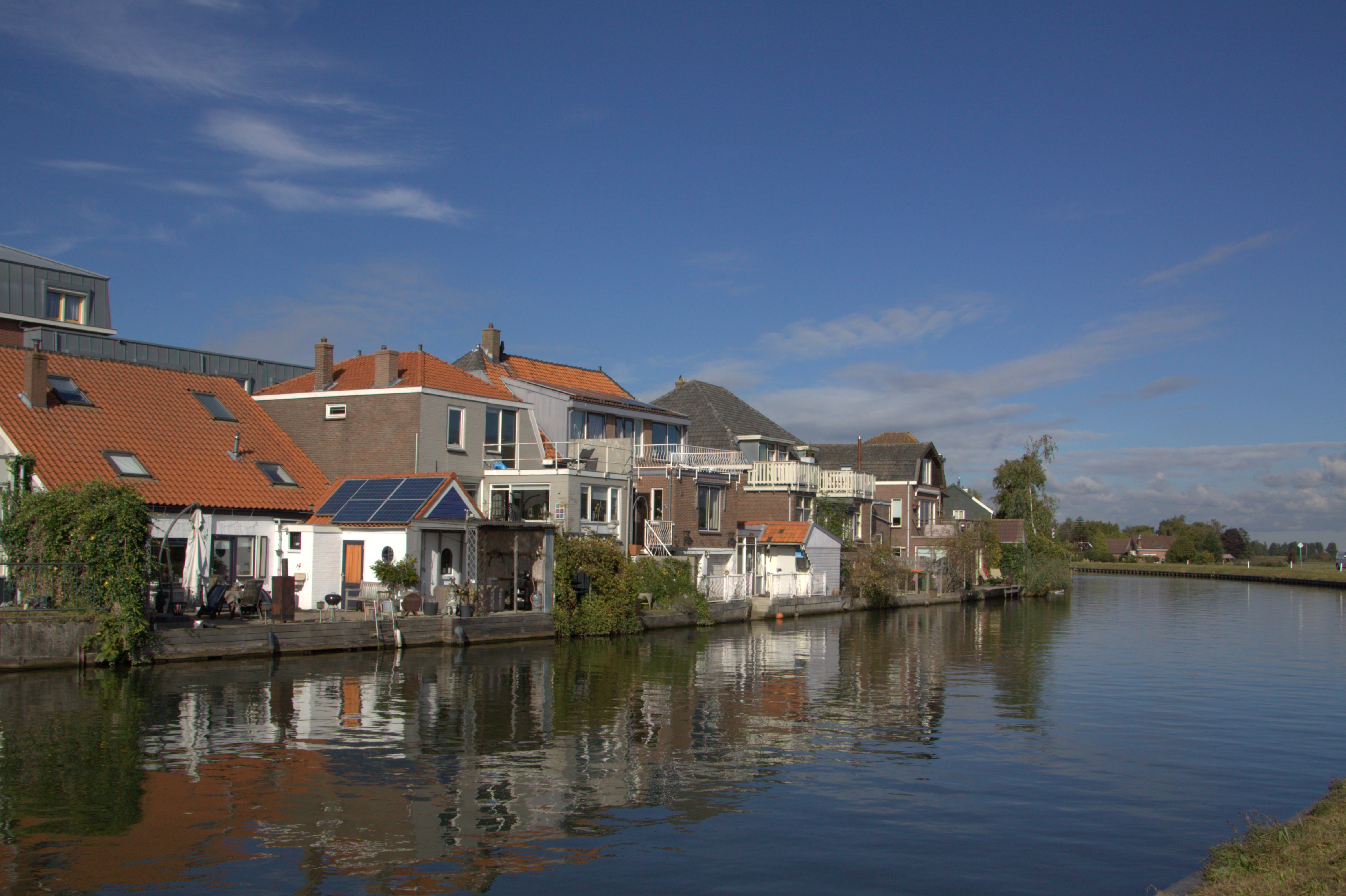 Huizen van de Dam in Arkel aan de achterkant gezien vanaf de Sluisweg aan de andere kant van het Merwedekanaal